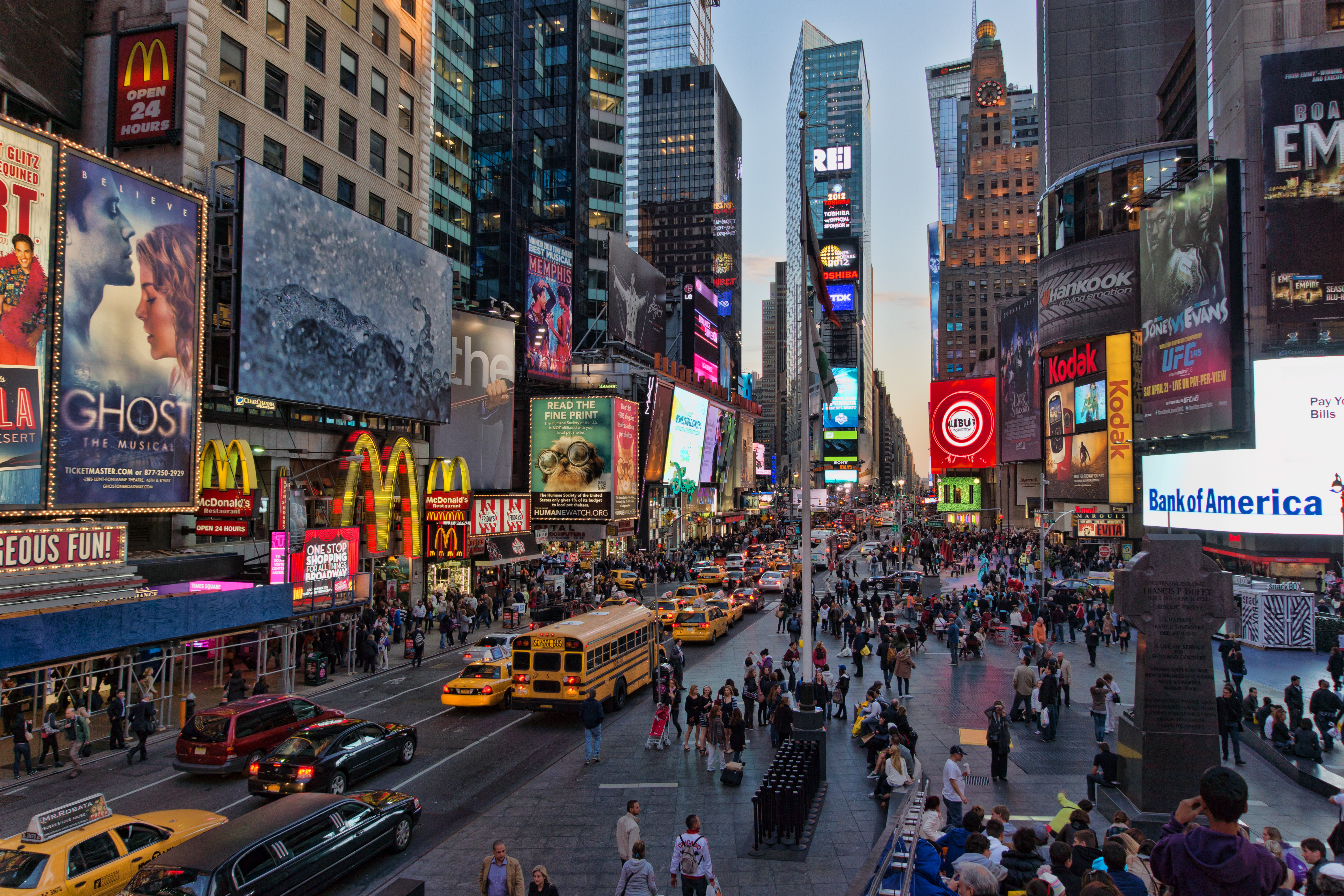 NYC - Time Square - Pris du haut des gradins